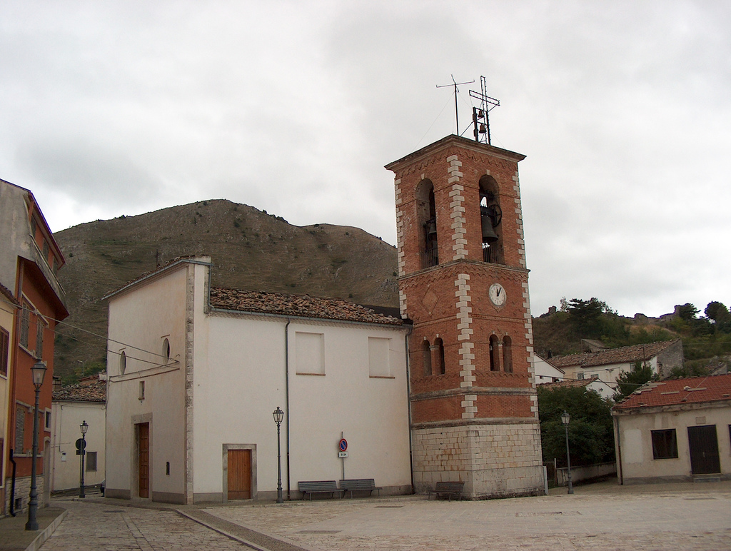 Civita di Bojano, Molise, Italy